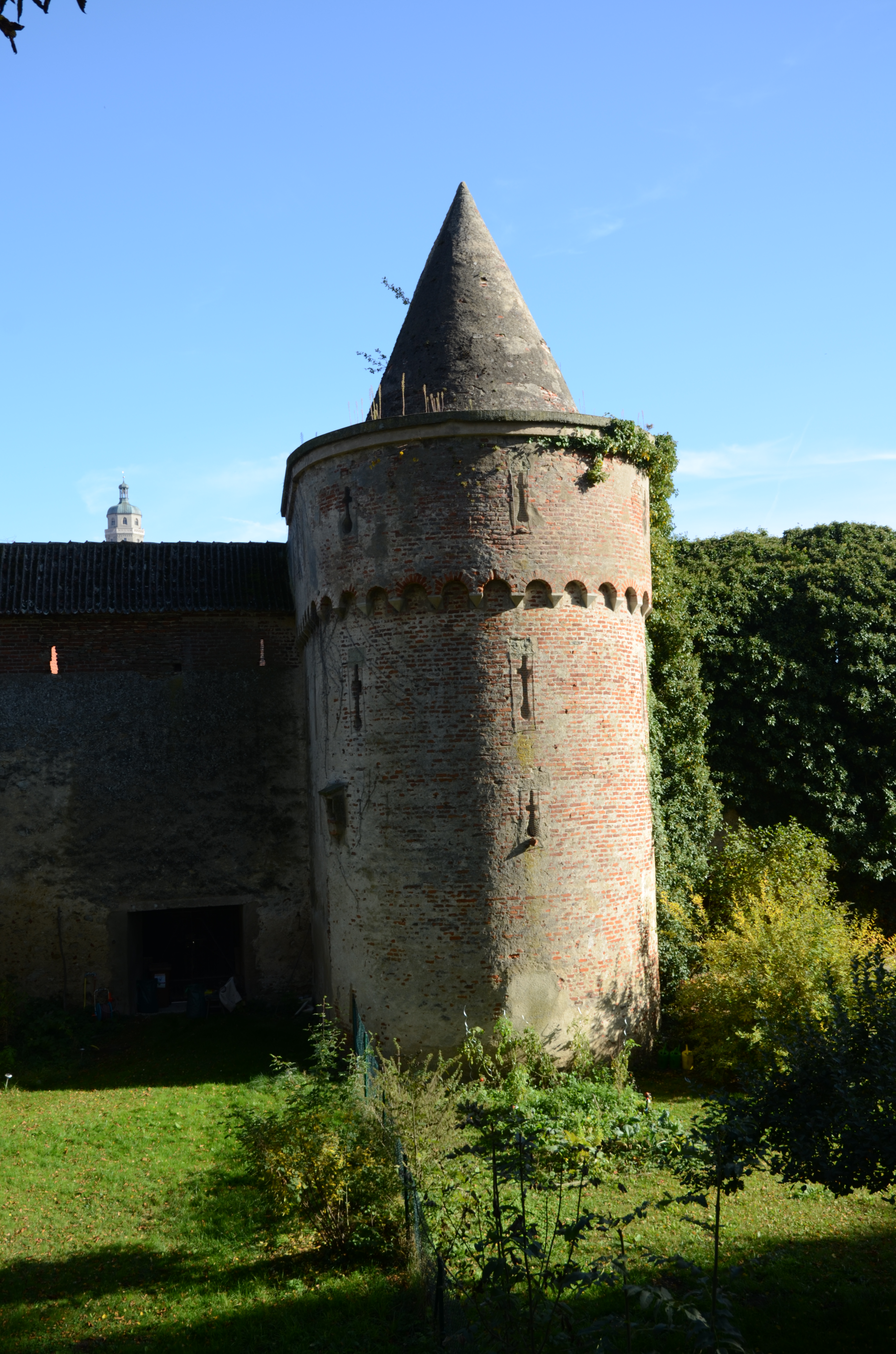 Nördlingen, An der Baldinger Mauer 1, Backofenturm